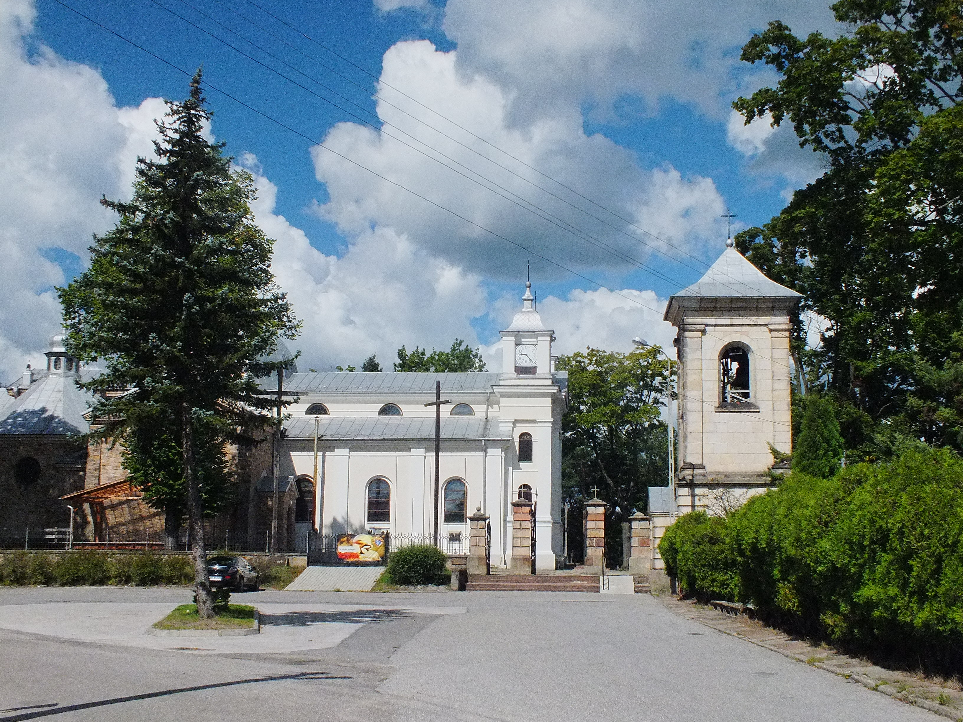 Suchedniów, kościół par. pw. św. Andrzeja Apostoła, lata 1758, 1852, 1912-1921